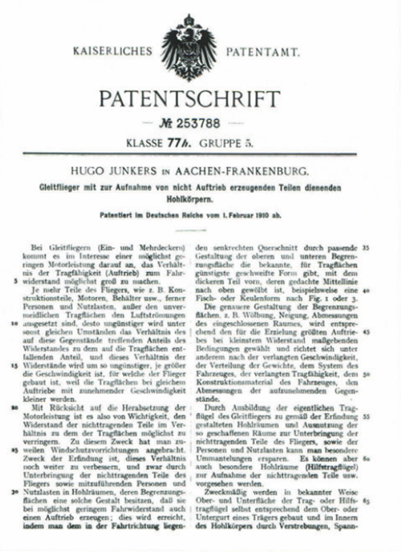 Kaiserliches Patentamt, Patentschrift Nr. 253 788 von Hugo Junkers (Gleitflieger mit zur Aufnahme ... Hohlkörpern.)